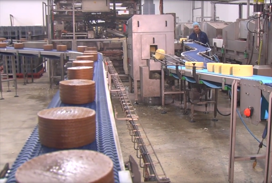 Juan Vicente Herrera visita la fábrica de Quesos El Pastor en Santa Cristina de la Polvorosa (provincia de Zamora).